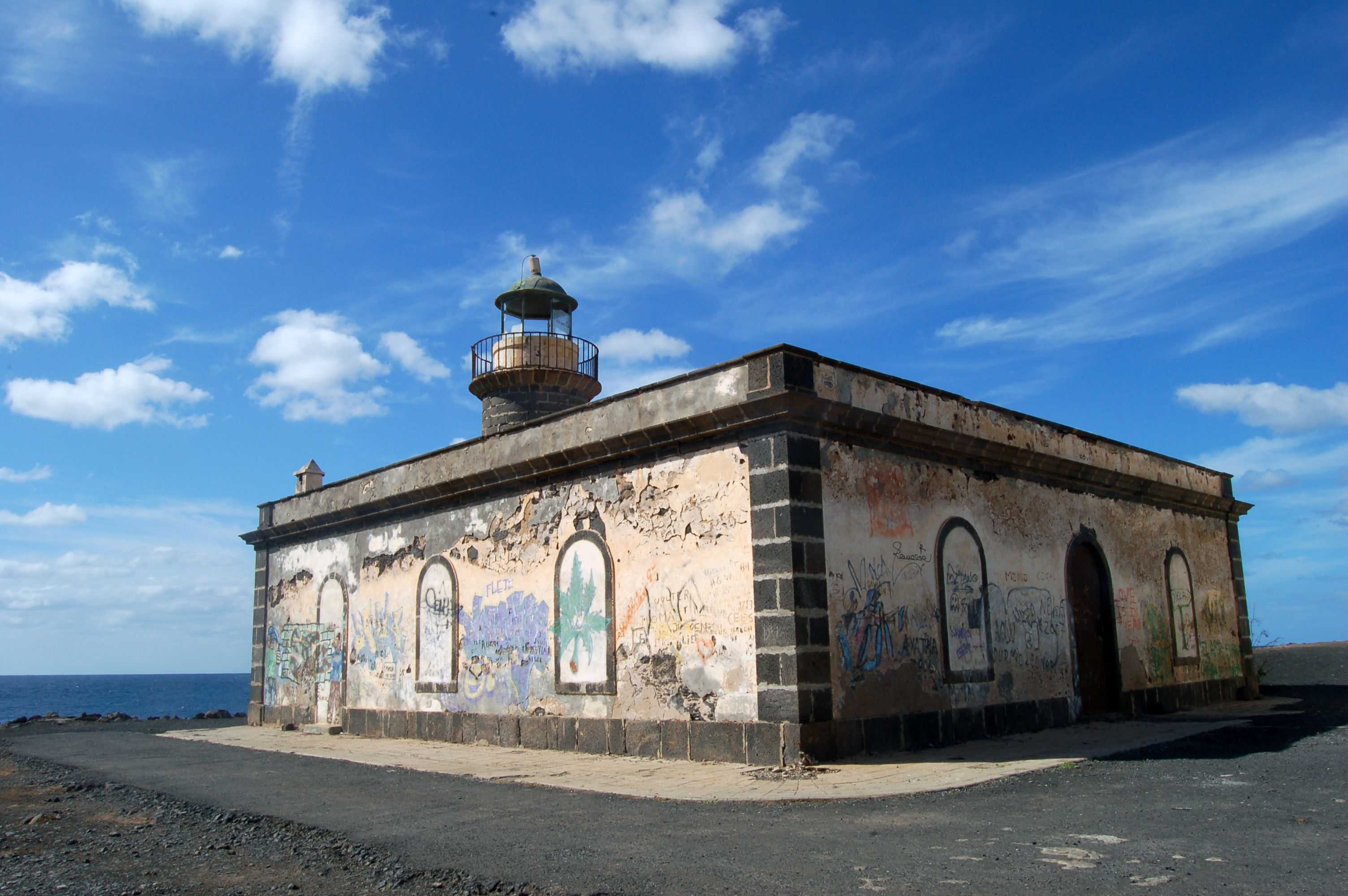 lanzarote